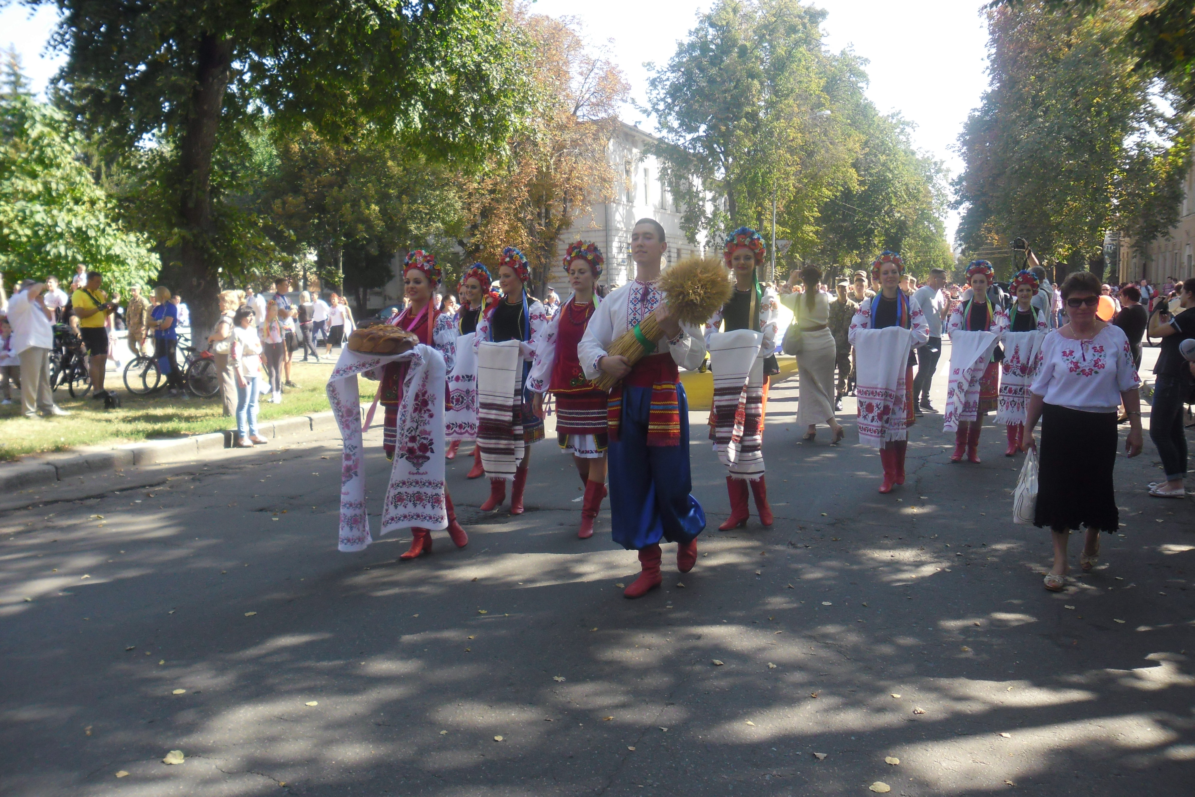 Фото